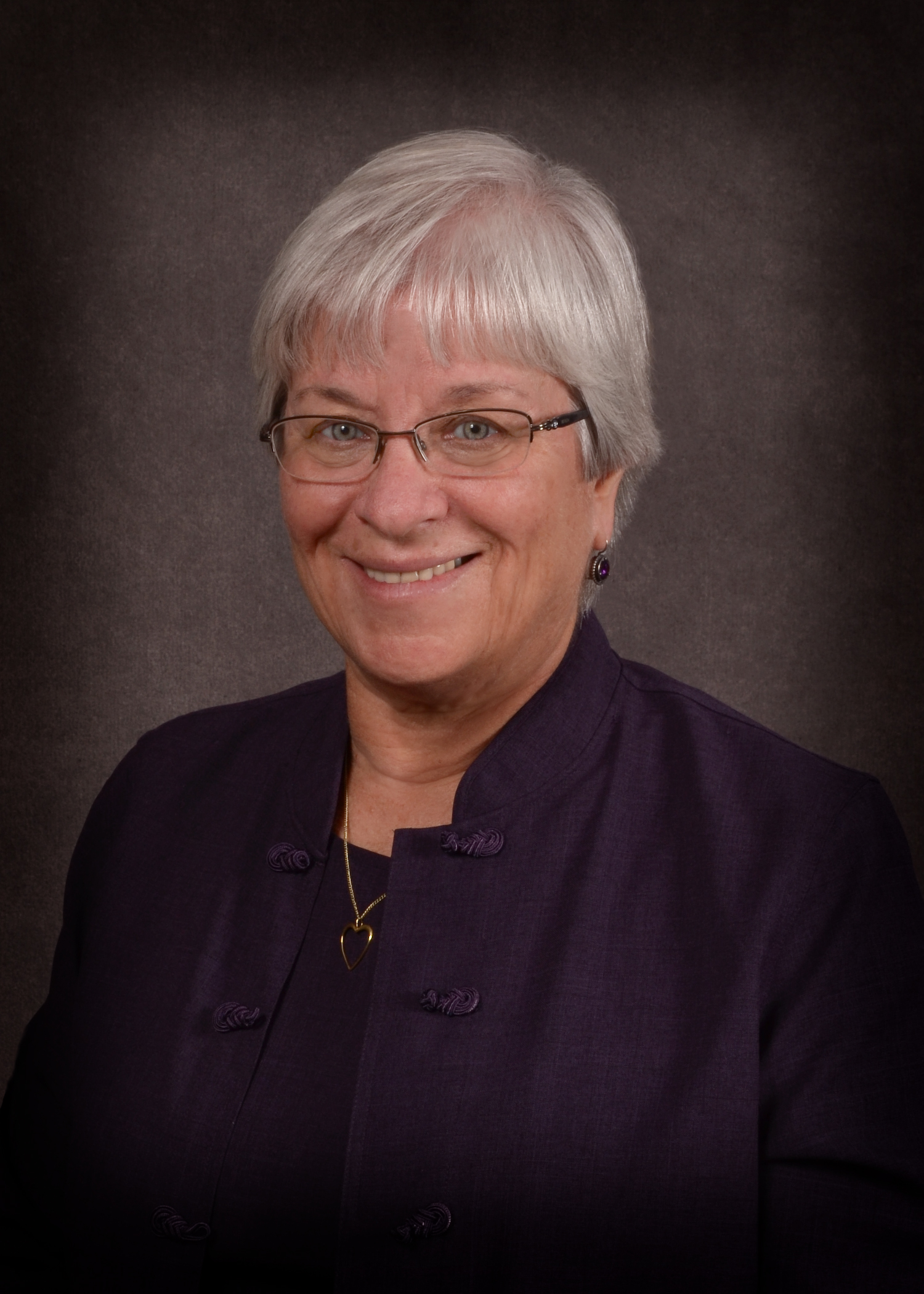 דיקן הקולג' לתקשורת המונים באוניברסיטת SIU - Southern Illinois University, Carbondale, חוקרת תקשורת בתחומים: ילדים, נוער ותרבות פנאי וכן דימויי נשים וגברים בתקשורת והבניית זהות מגדרית; באמצעי מדיה כגון, טלוויזיה, רדיו ומדיה דיגיטלית